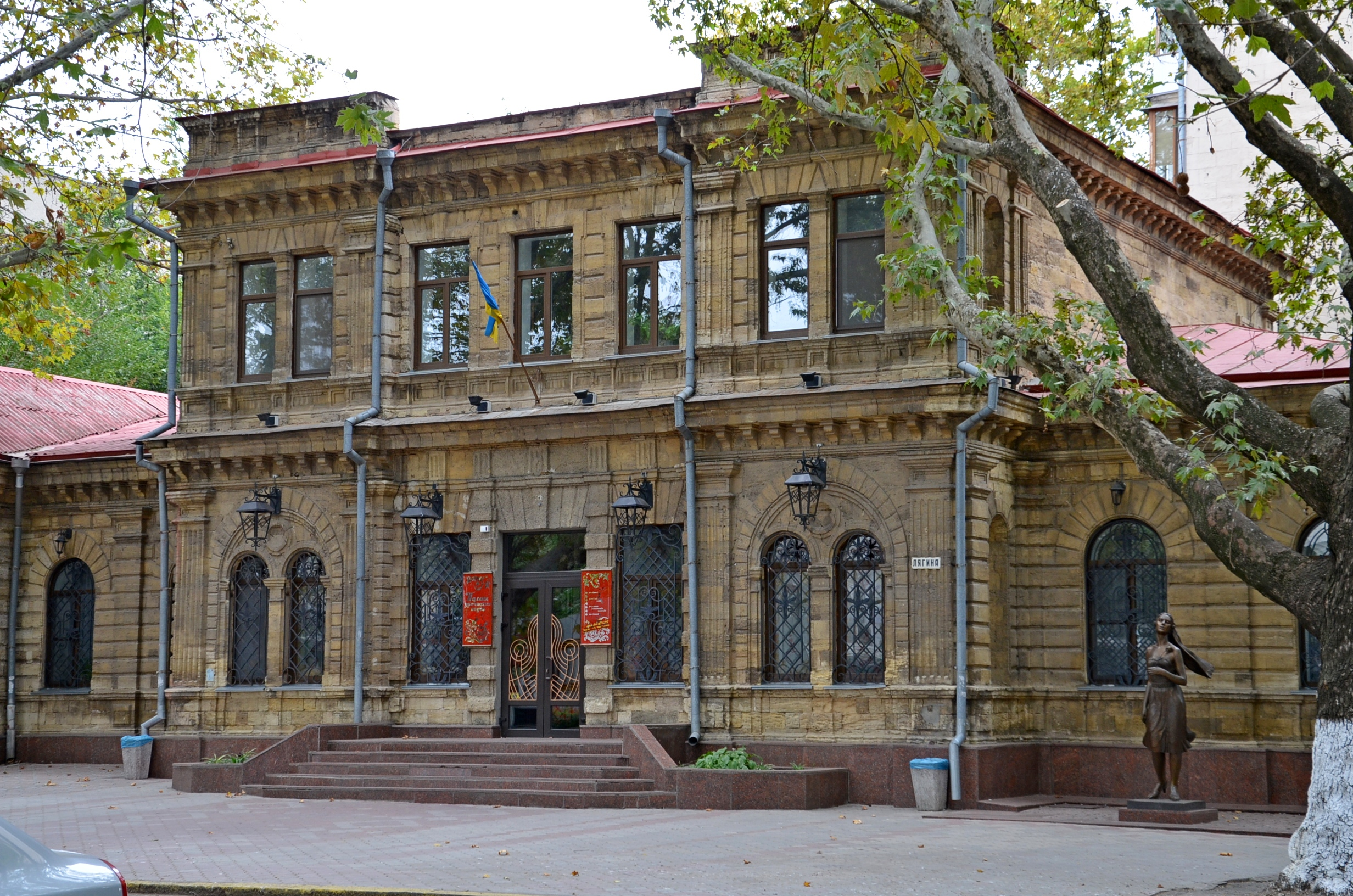 Громадська бібліотека, Миколаїв, вул. Спаська, 44